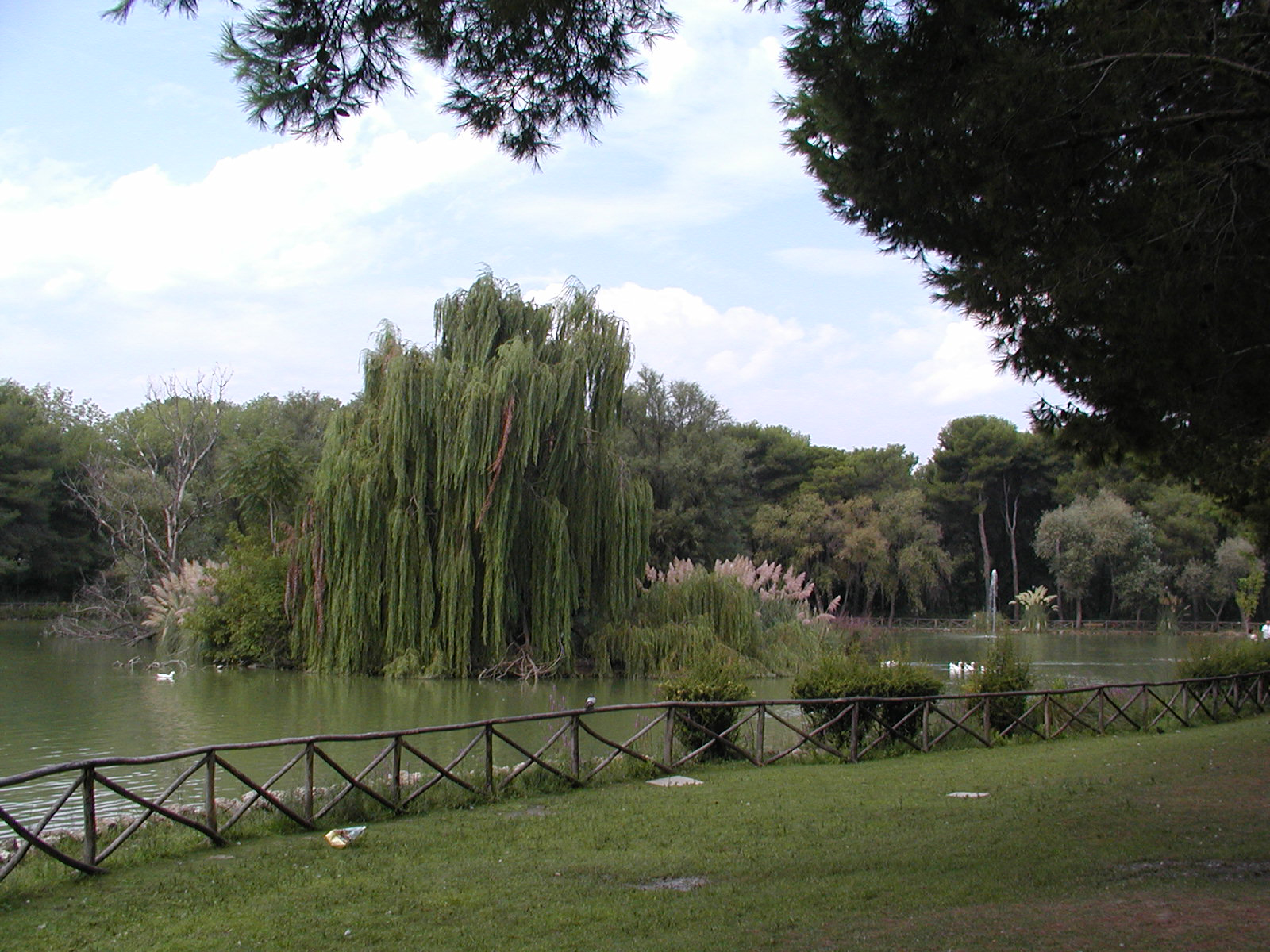 Der Park La Pineta Dannunzieana.